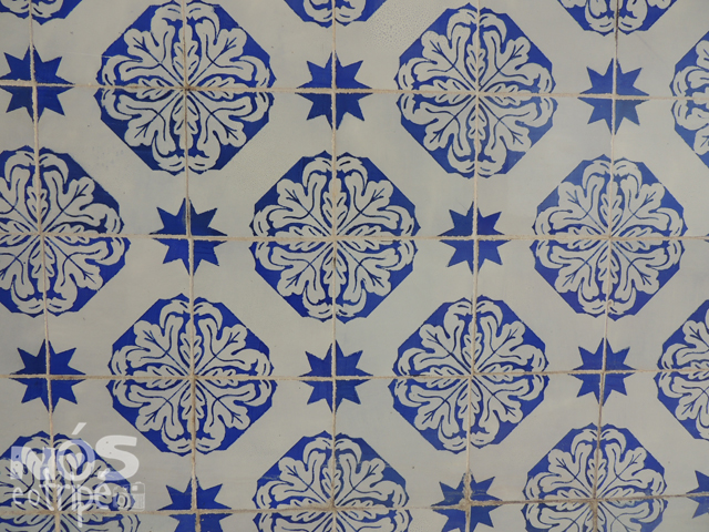 Ænglisc: Centro Histórico de São Luís, Maranhão, Brasil